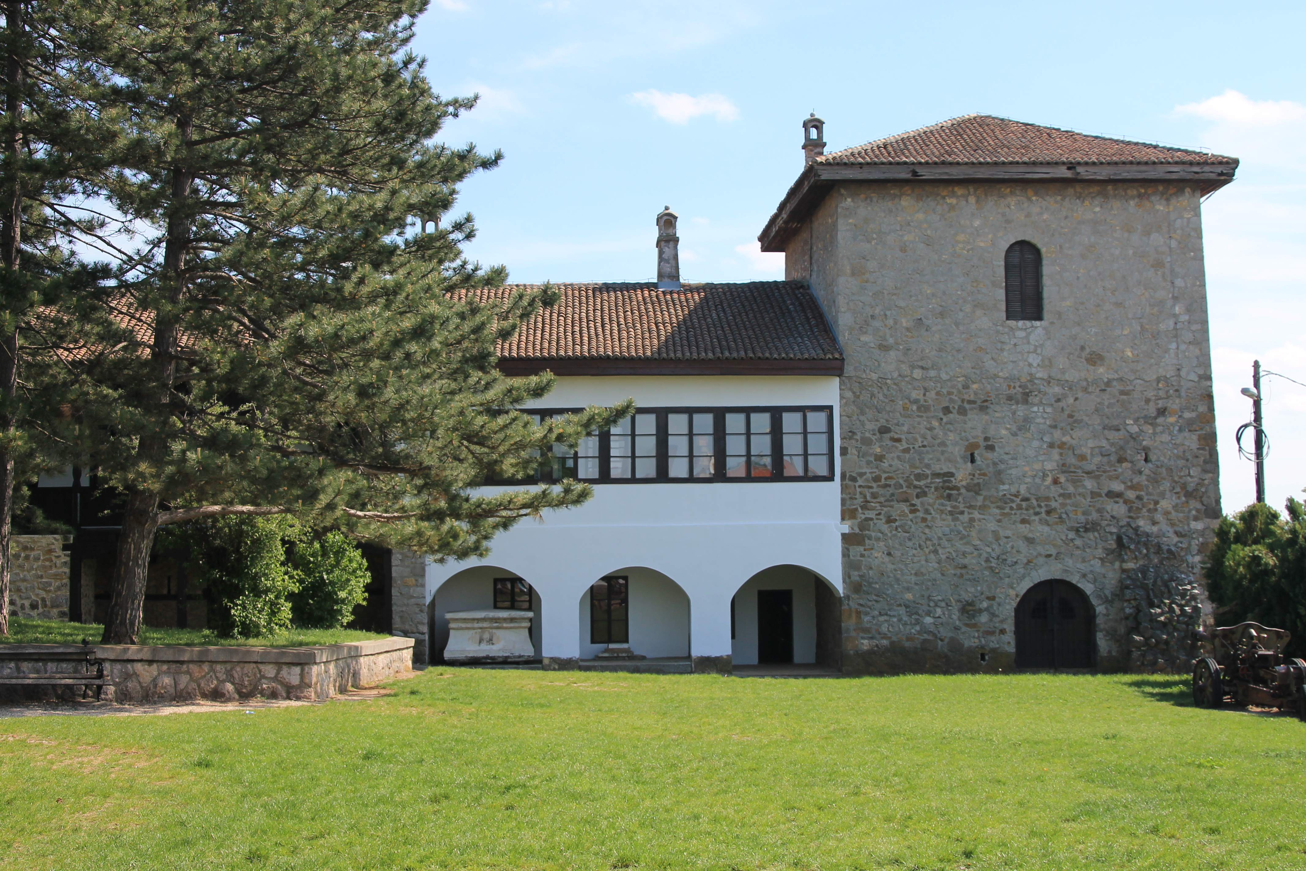 Karađorđev konak